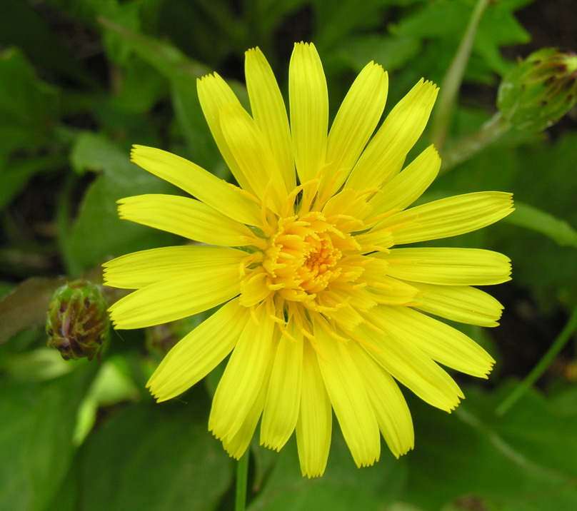 Pušyninės gelteklės (Scorzonera humilis) žiedas Šeima. Astriniai (Asteraceae) Foto: Algirdas, 2006 m. gegužės 20 d., Lietuva